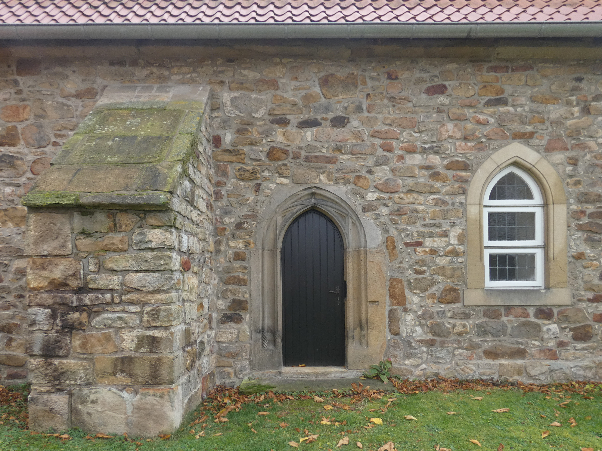 Die "Langredersche Tür" an der Nordseite des Schiffs der Heilig-Kreuz-Kirche in Kirchdorf, Stadt Barsinghausen,Region Hannover, Niedersachsen